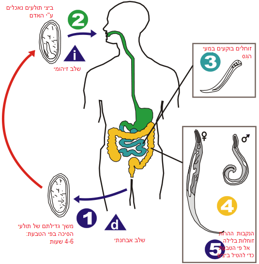 מצוות לערך אנטרוביאזיס